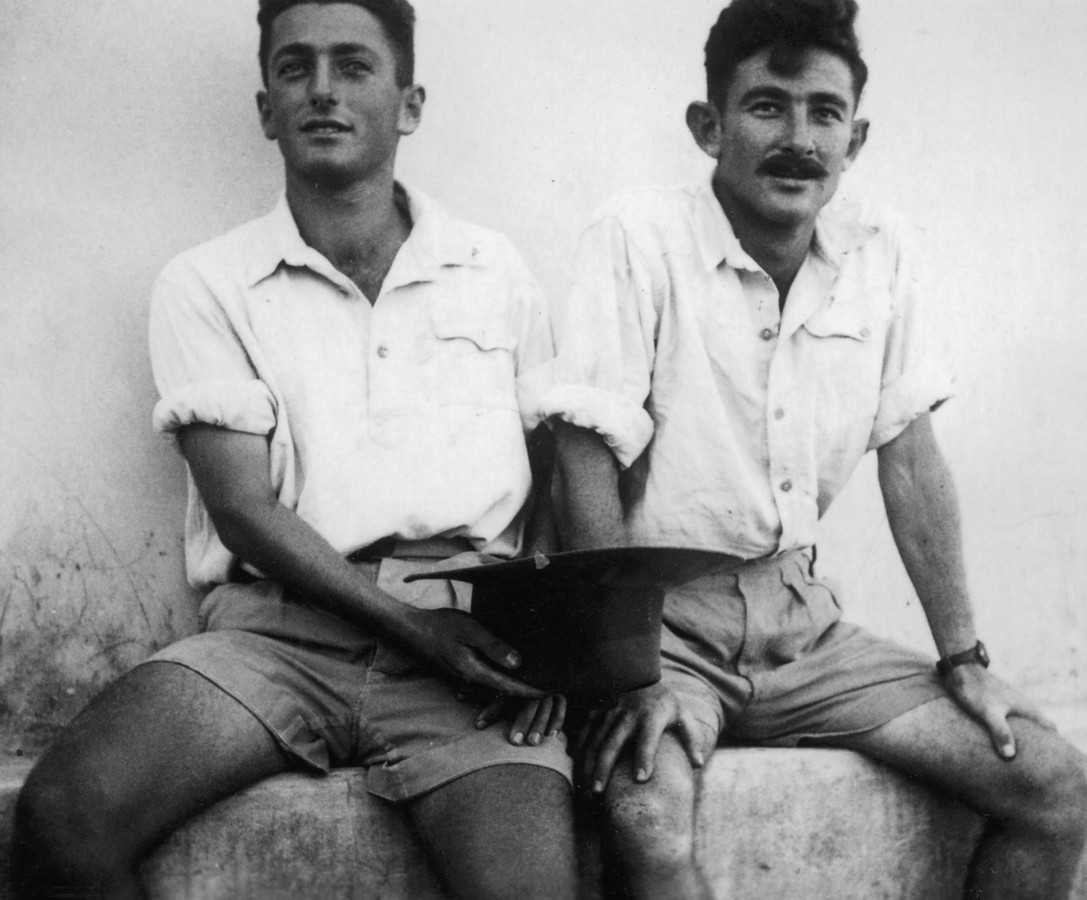 פלוגה ו בגליל ובעמק 1941-1947 - פלוגה ו' 1941 - 1947 - הכשרת גניגר הצופים ג'. אורי זלטין (מ"כ), יהונתן דולניסקי (מ"מ)